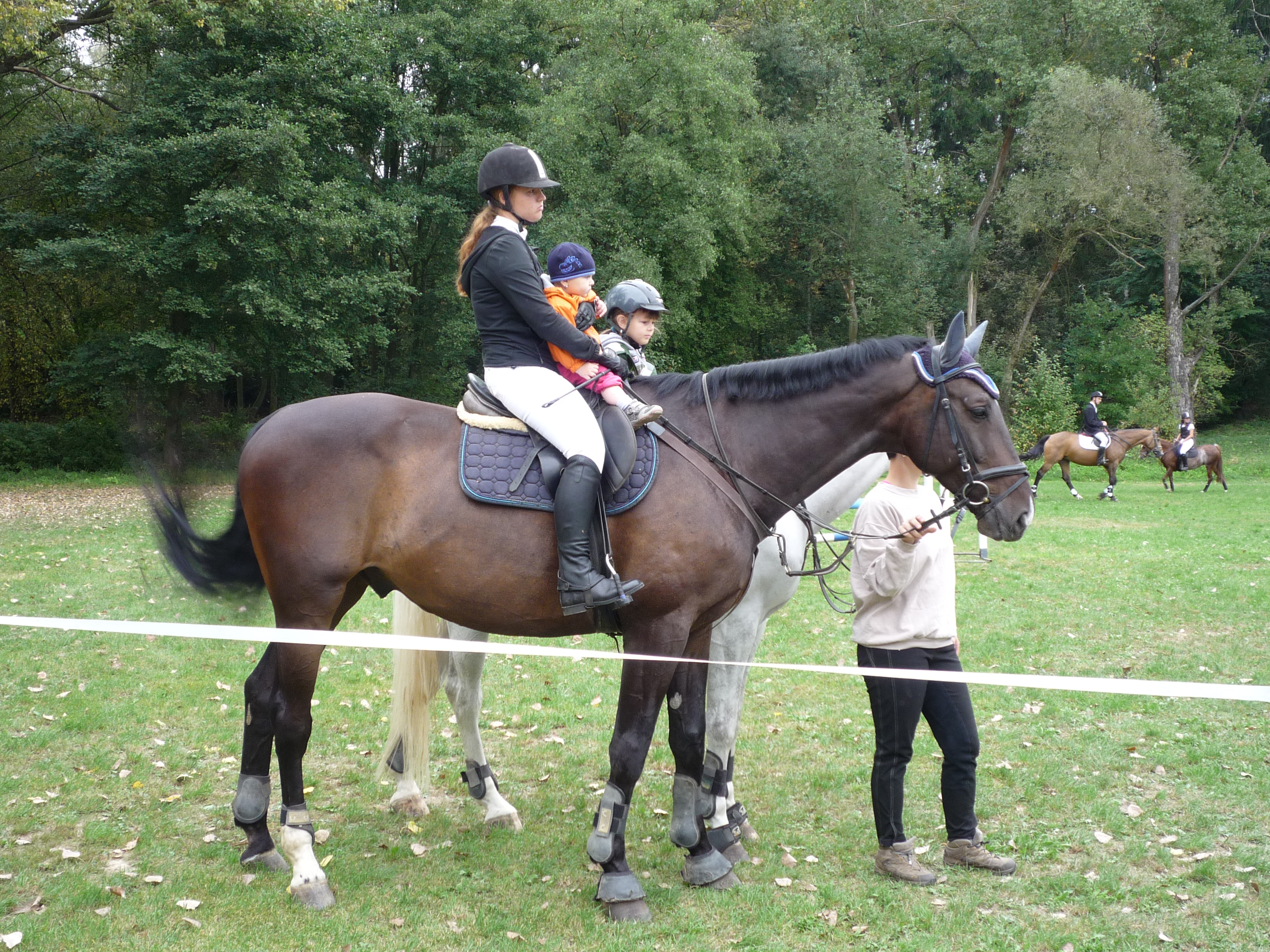 Autor fotografie Jiří Zelenka. Parkurové závody koní. Areál Žabinec (ulice Na Riviéře) . Akce se konala dne 18.9.2016 v Havlíčkově Brodě. Kraj Vysočina. Czech Republic